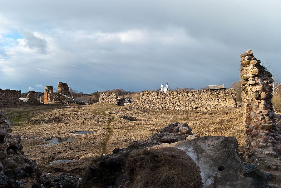 Беларуская (тарашкевіца): Фрагмэнты замку. в. Крэва This is a photo of Belarusian heritage monument. Reference number: 412Г000602 ( WLM)